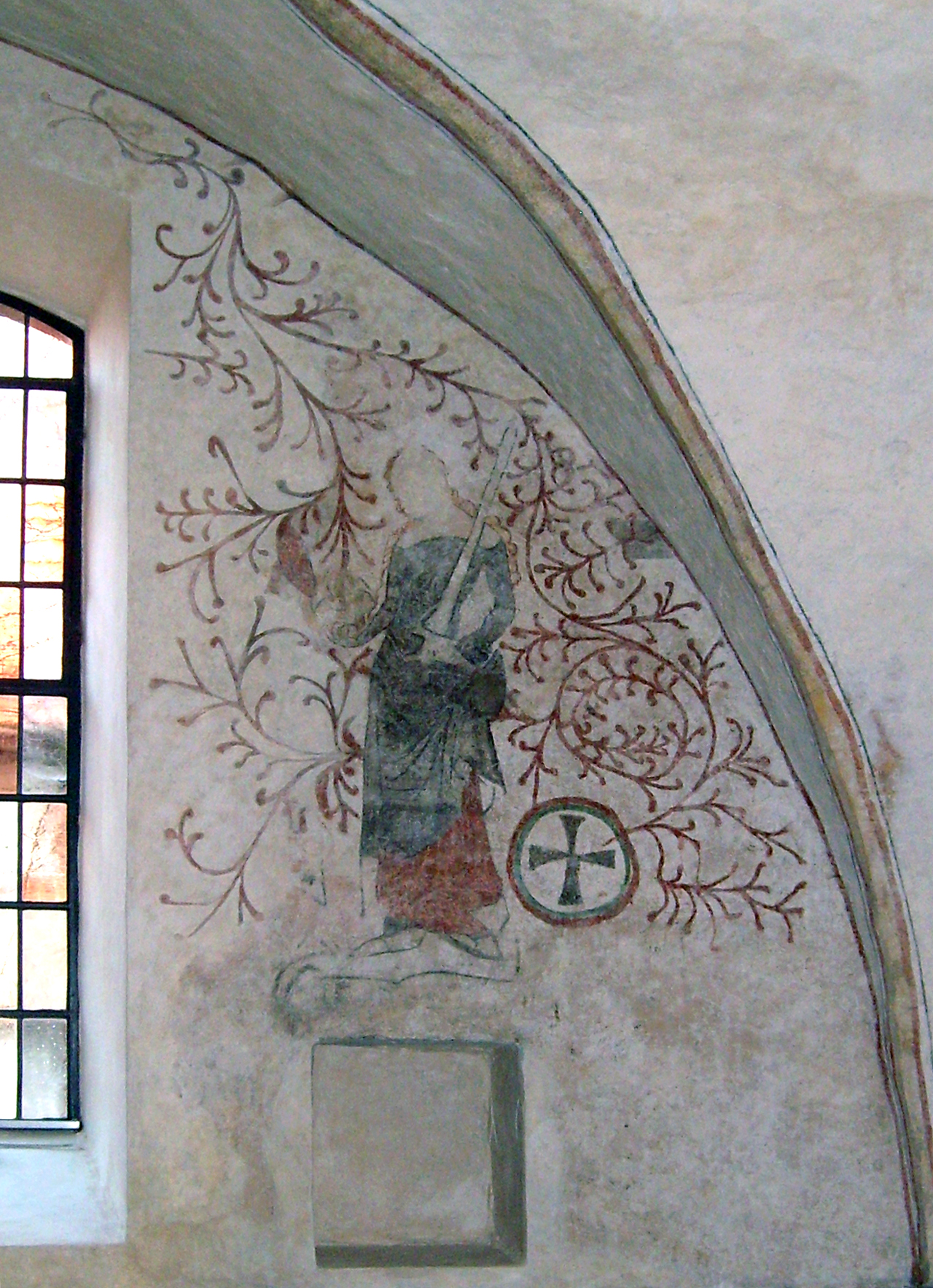 Freske in der St. Margarethen-Kirche in Vernawahlshausen. Laut Info der evangelischen Kirchengemeinde des Ortes die Darstellung der Heiligen Margareta von Antiochia mit Schwert in der linken und Drachenkopf in der rechten Hand.